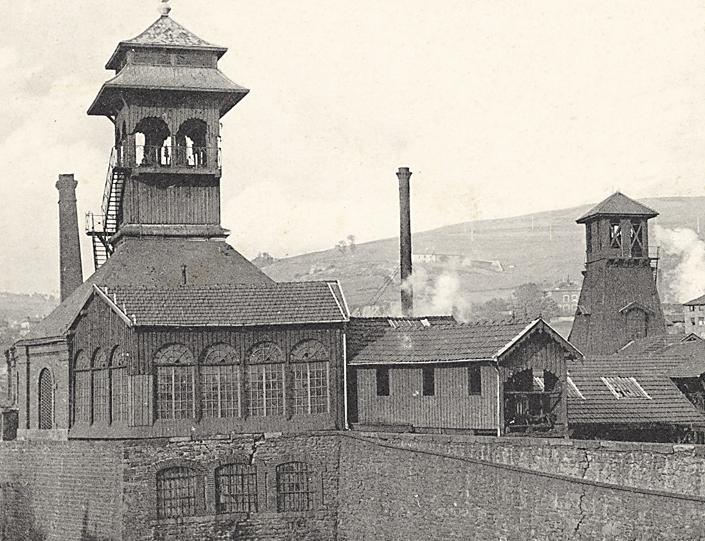 Puits Chatelus Saint-Etienne, Fr